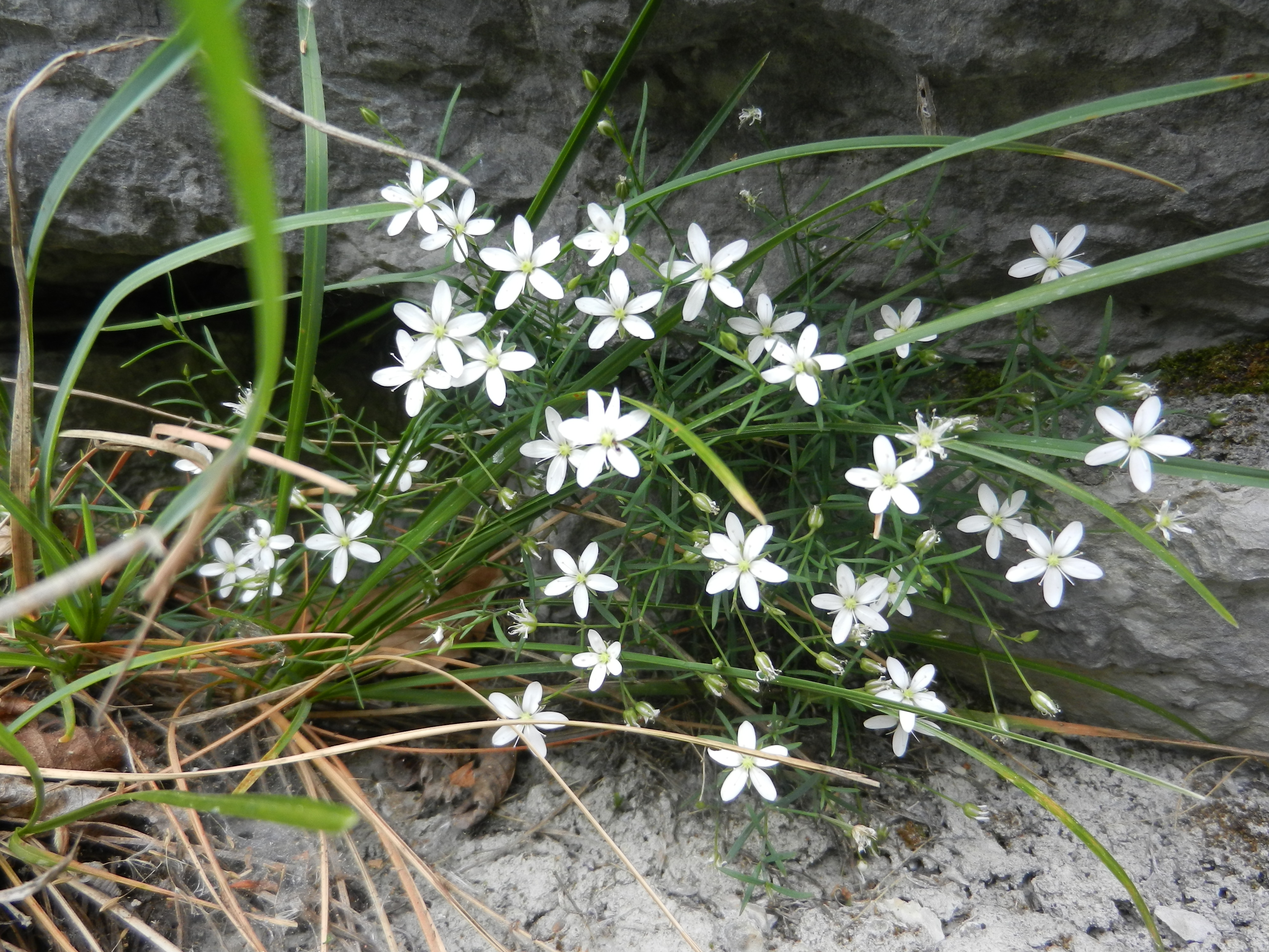 Kratkodlakava popkoresa v soteski Driselpoh, Baška Grapa.